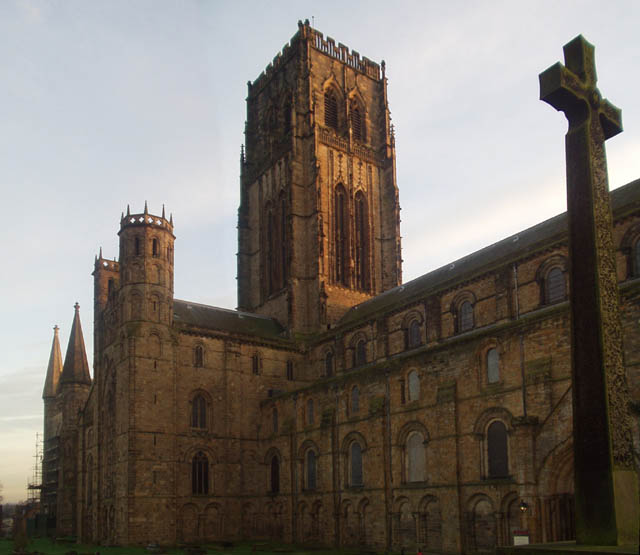 Durham Cathedral